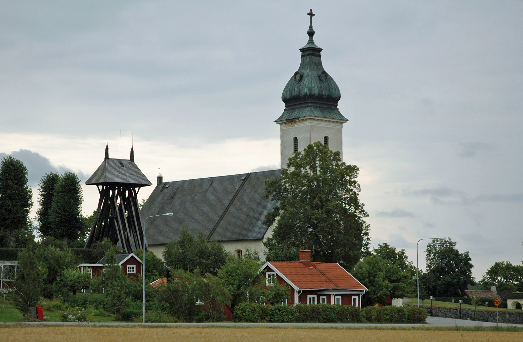 Bettna kyrka